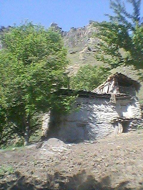 नेपाली: हुम्ला जिल्लाको एक सामान्य घर